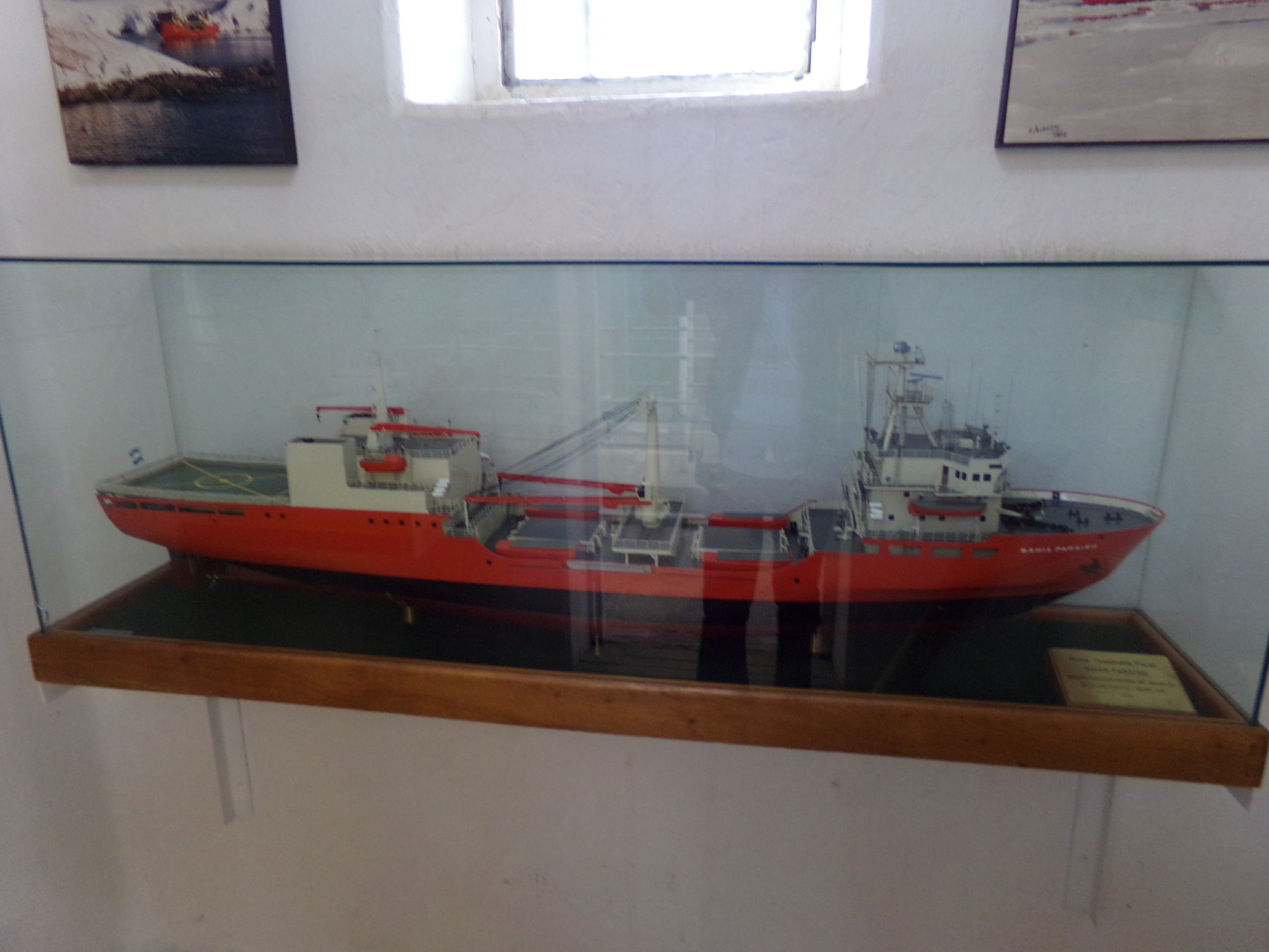 Museo Maritimo y Ex Presidio de Ushuaia, TDF, Arg